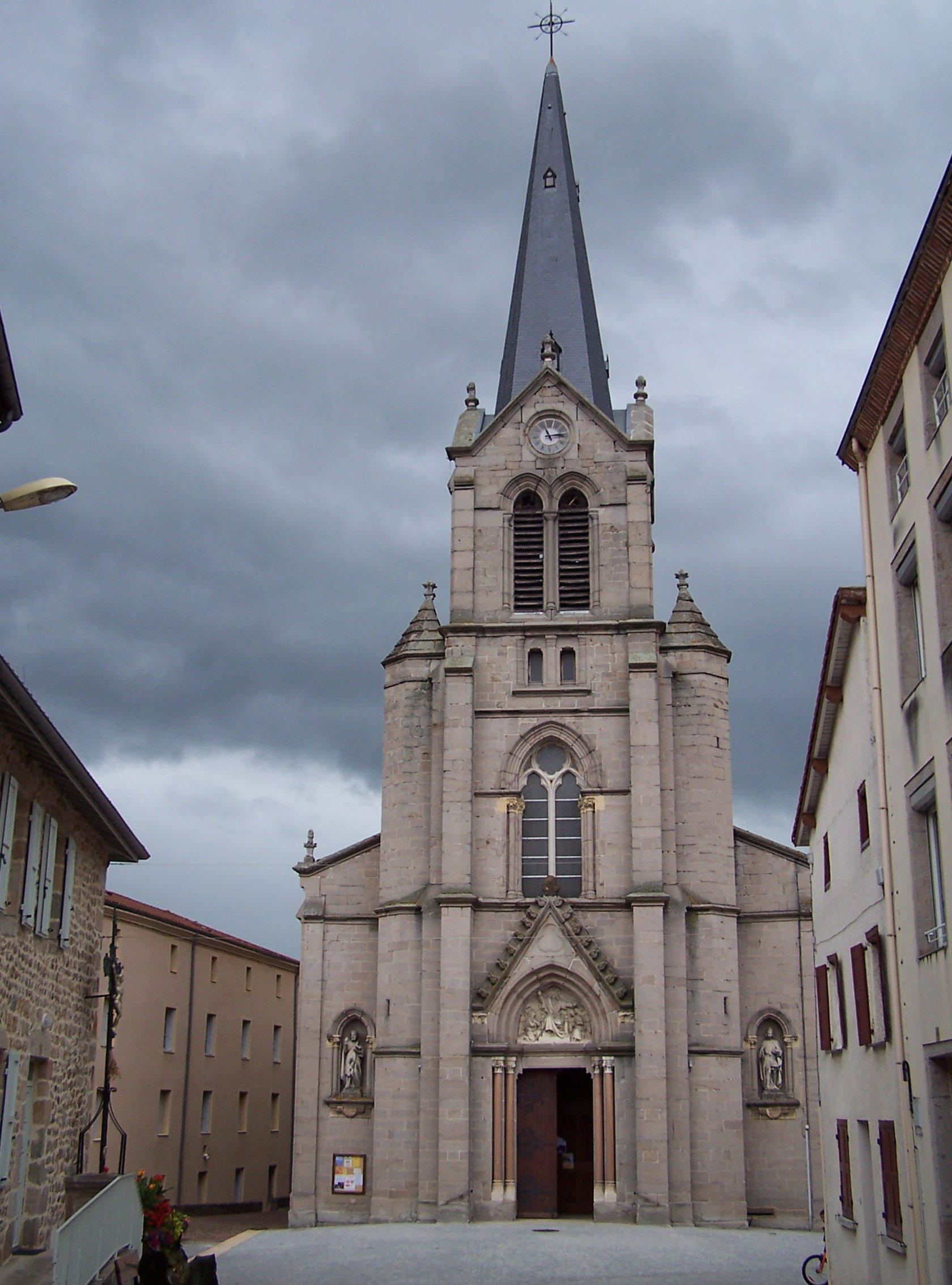 Église Saint-Thyrse de Bas-en-Basset en Haute-Loire